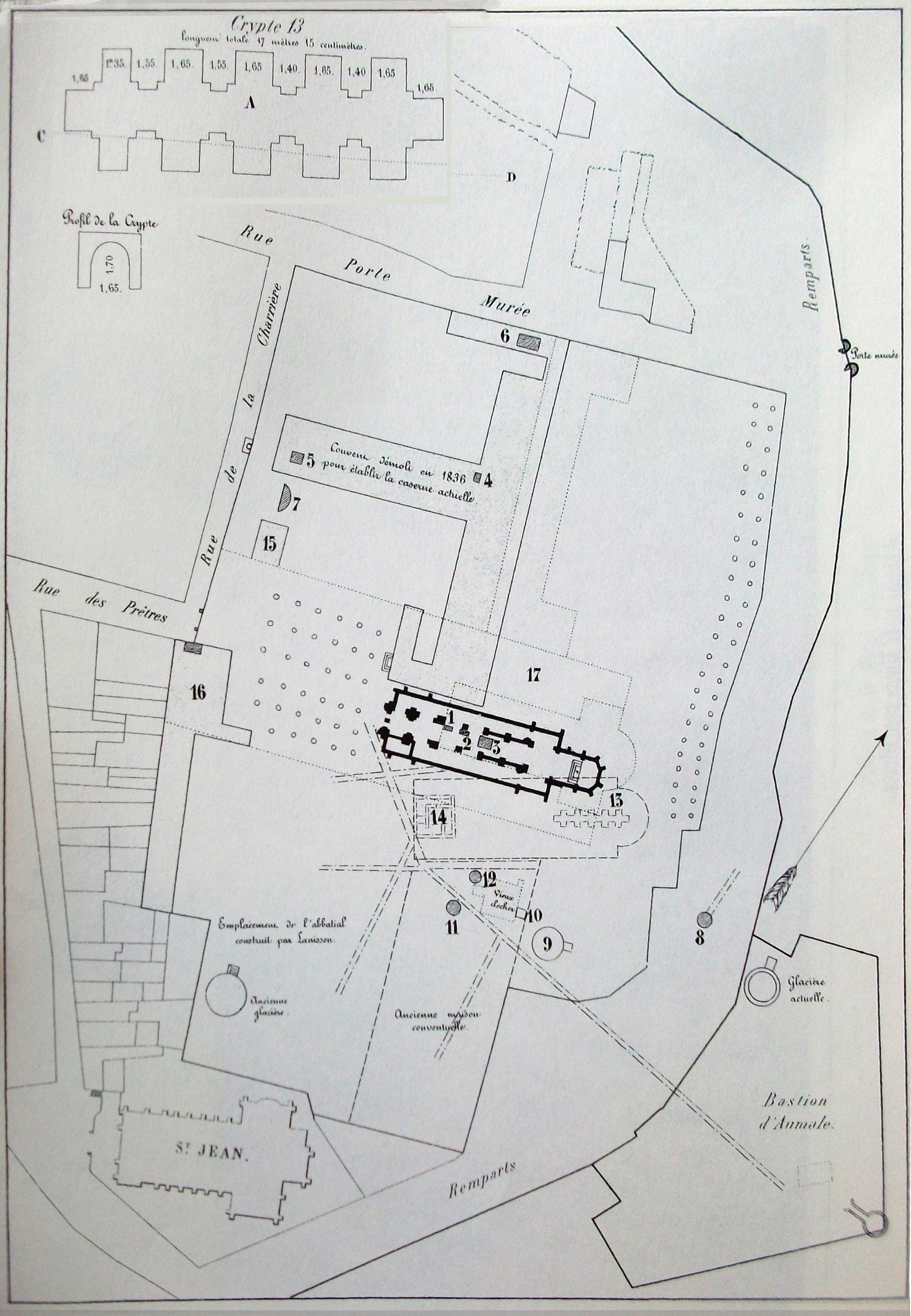 Vue du bâtiment principal .